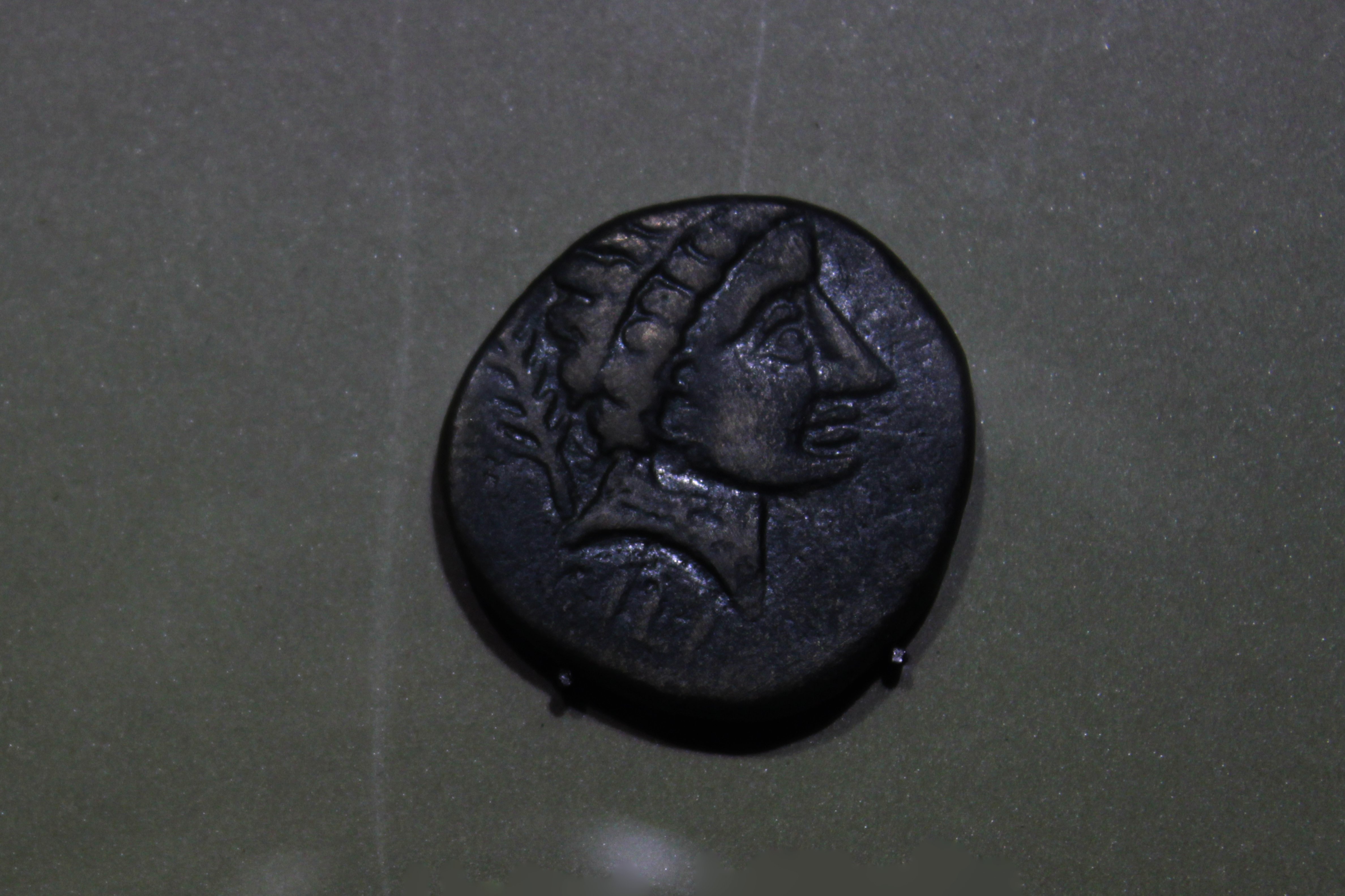 Moneda romana de Saetabi, unidad bilingüe, siglo I aC. Depositada en el Museo de Prehistoria de Valencia, Comunidad valenciana, España.